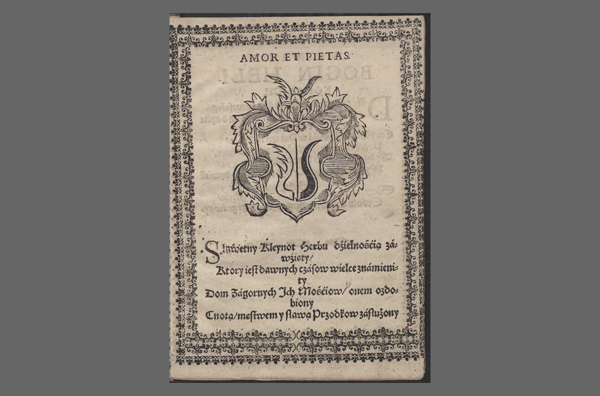 Na Chwalebny i Zacny Akt Jakuba Zagórnego i Zuzanny Konopniczanki" [W:] Ossolineum, dział starodruki, syg. 2285